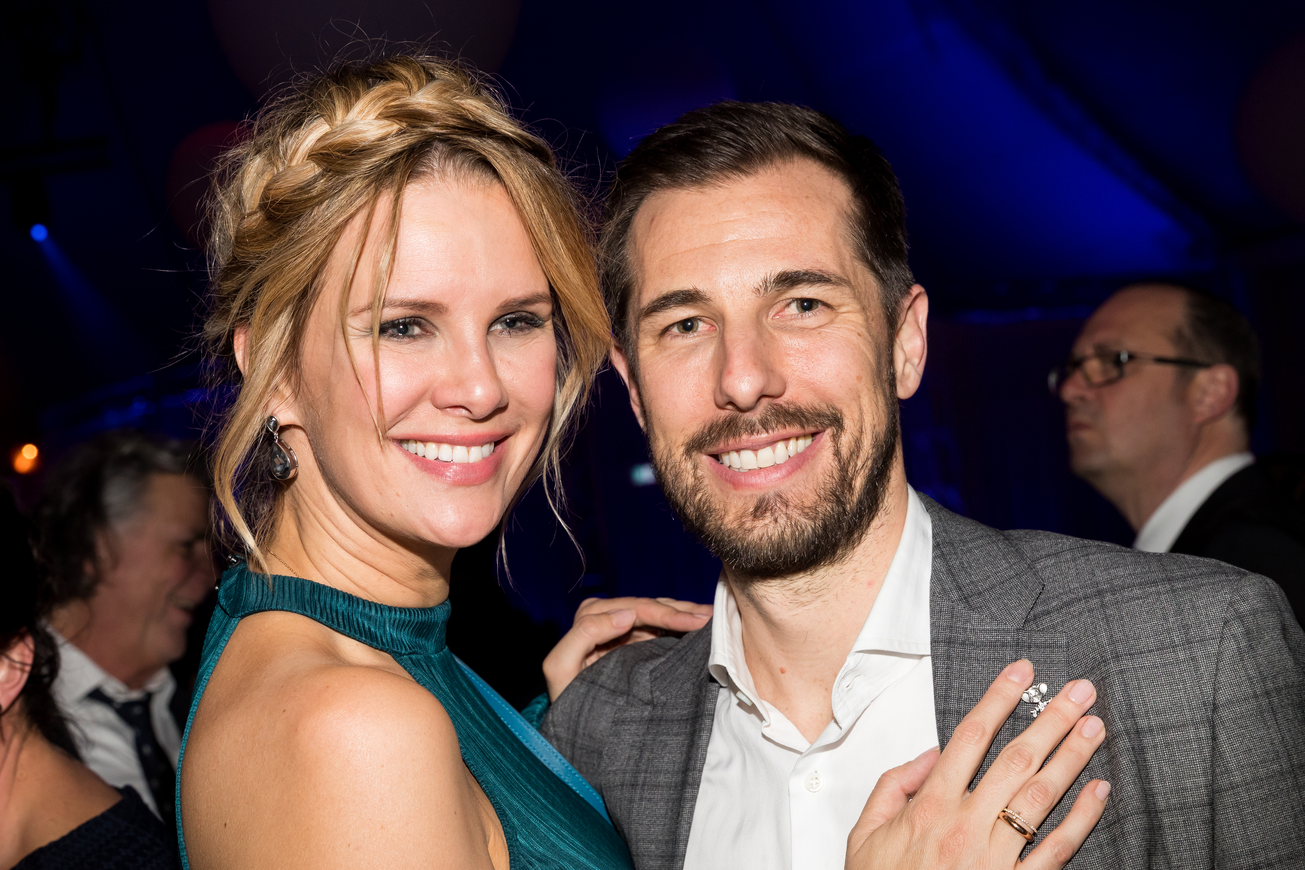 during Radio Regenbogen Award 2018 at Europapark, Rust, Baden-Württemberg, Germany on 2018-03-24, Photo: Sven Mandel